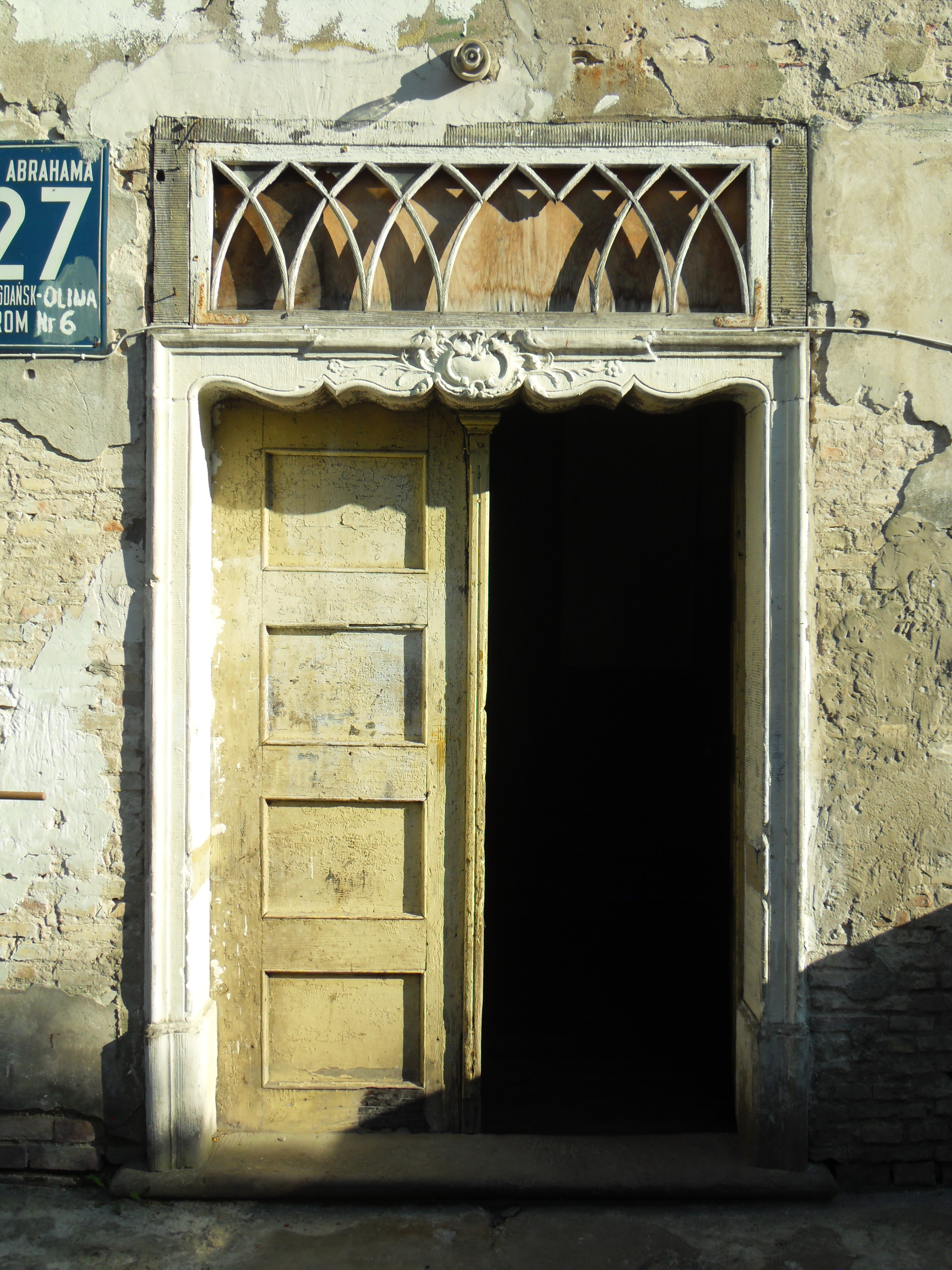 Gdańsk VII Dwór, ul. Abrahama 27, wejście główne (rokokowy portal).